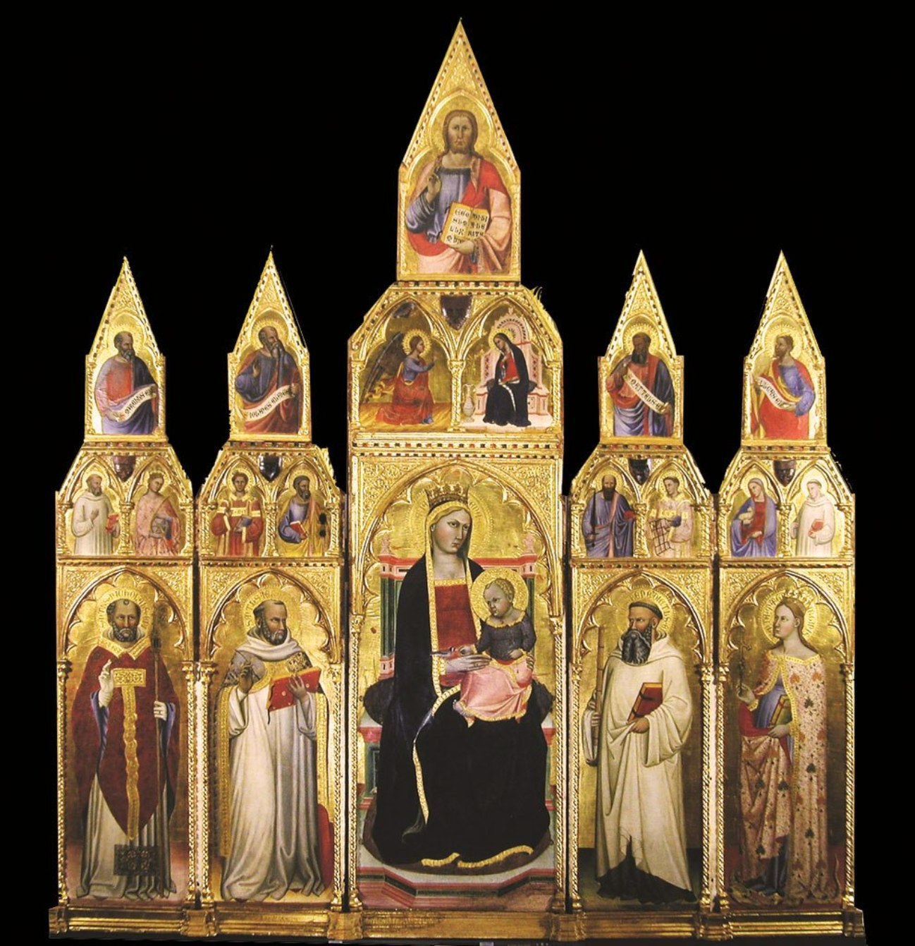 Polyptych from Agnano